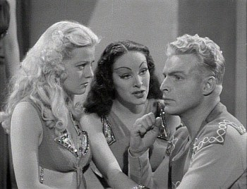 Screenshot dal DVD originale del film Flash Gordon (1936)